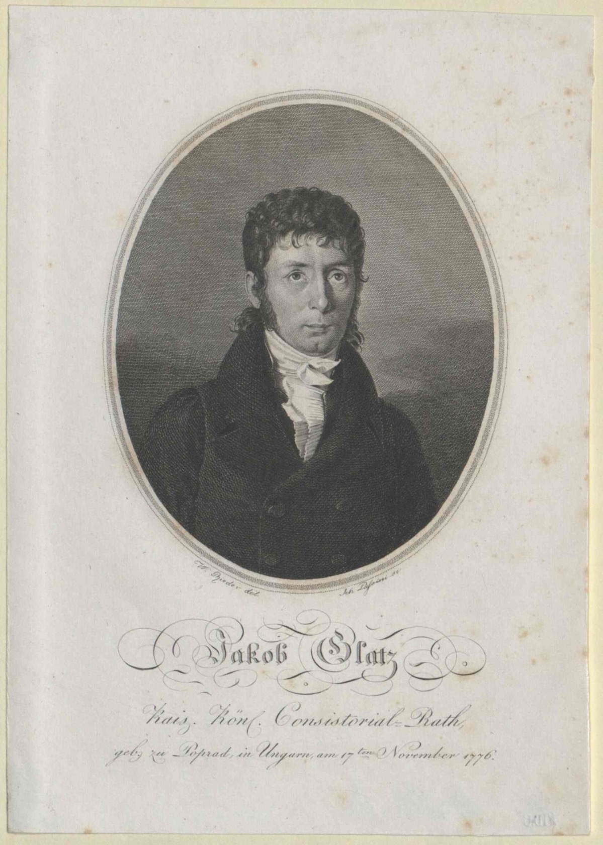 Evangelischer Theologe und Schriftsteller